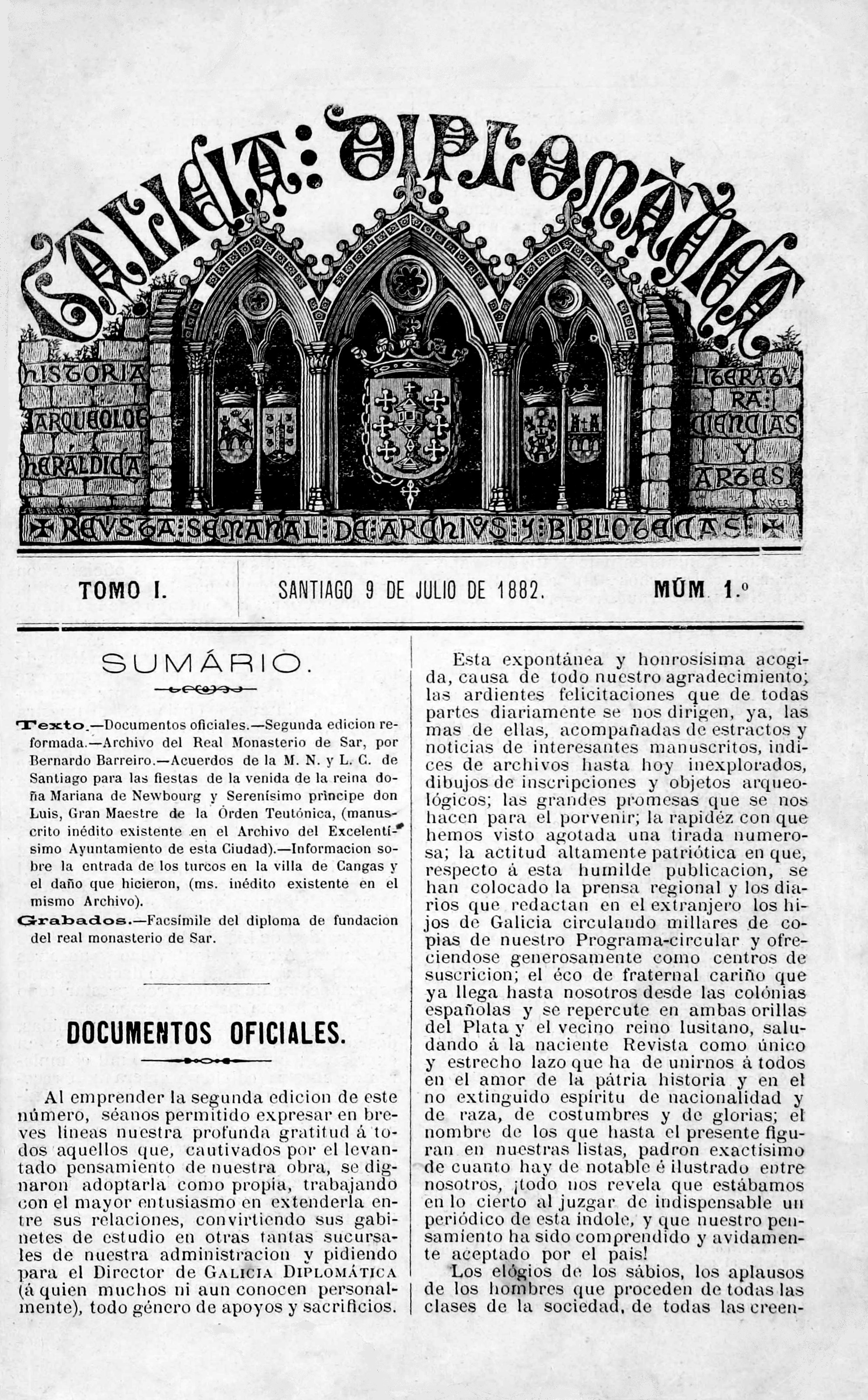 Galicia Diplomática, 1882, 1, portada